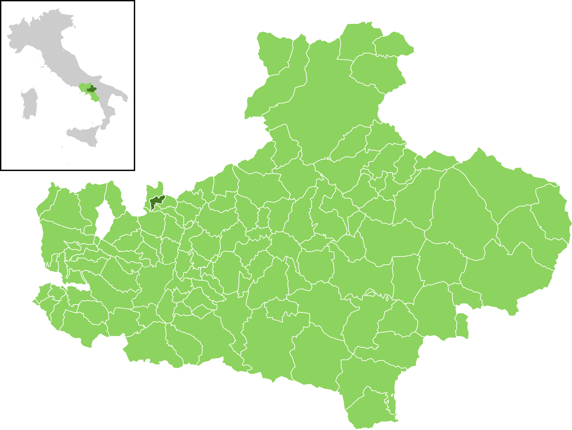 Posizione del comune all'interno della provincia di Avellino